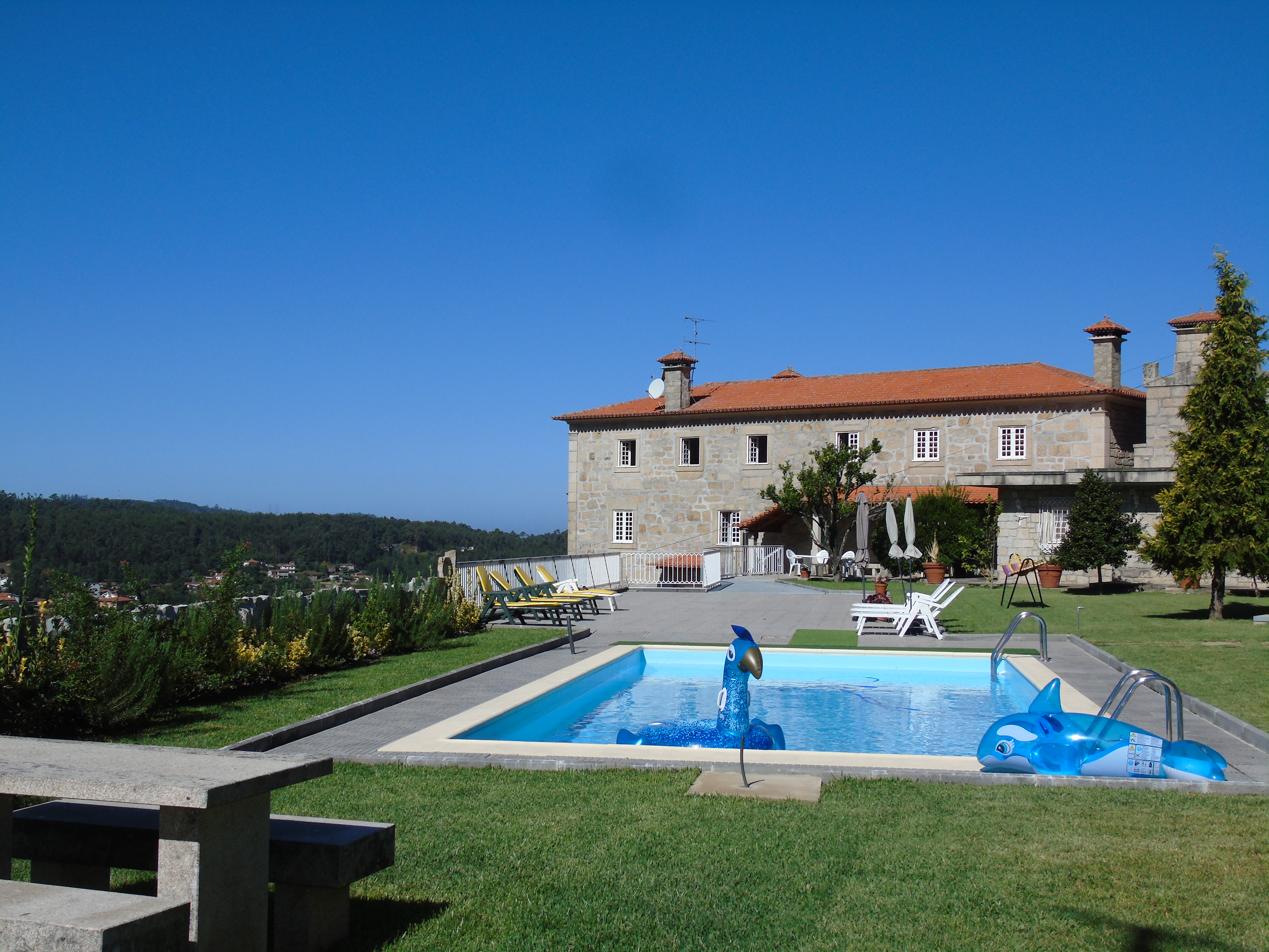 Vista Traseira da Casa do Castelo de Fermedo